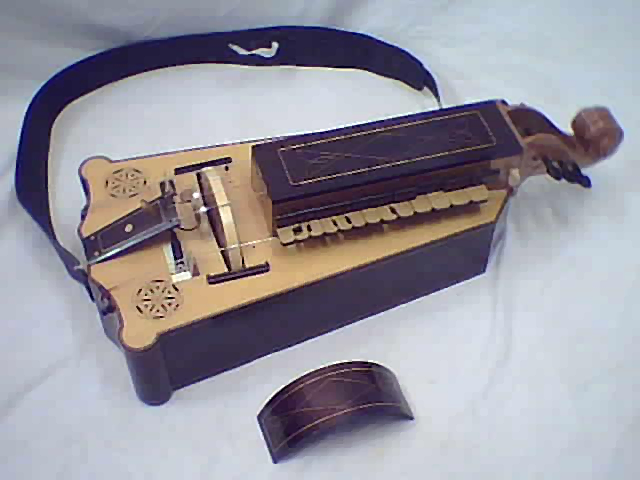 Vielle à roue